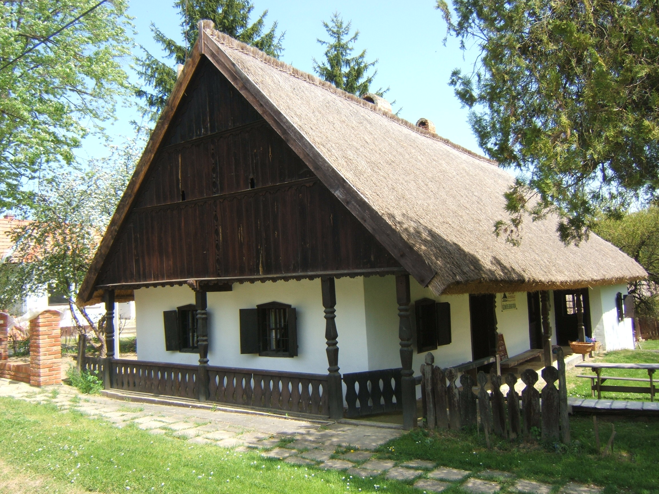 Magyarlukafa, műemlék tájház